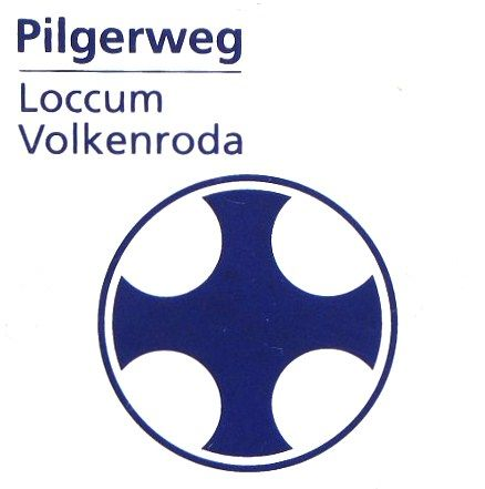 Beschilderung des Pilgerwegs Loccum - Volkenroda